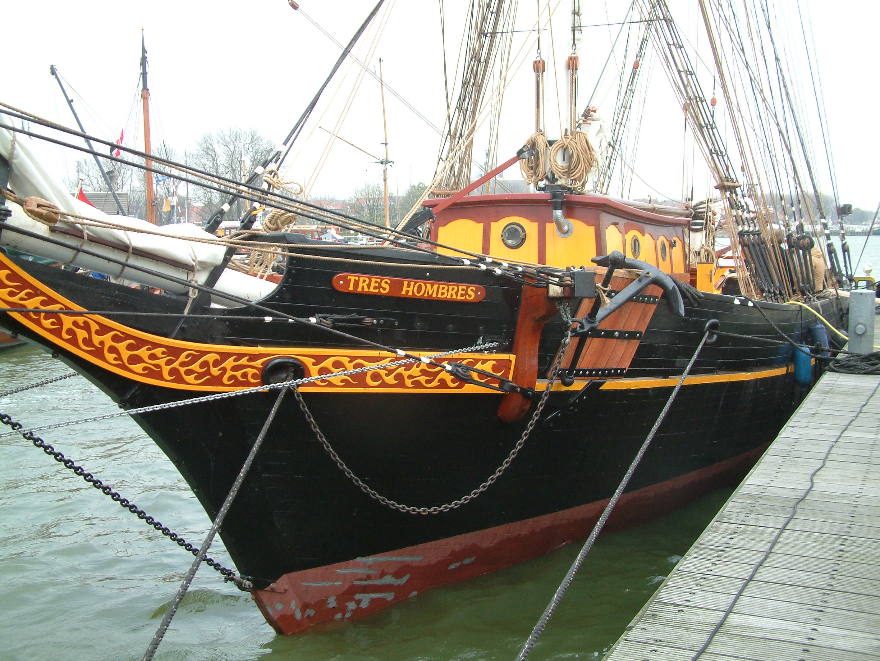 De TRES HOMBRES is een zeilend vrachtschip, dat probeert de zeilende handelsvaart nieuw leven in te blazen.